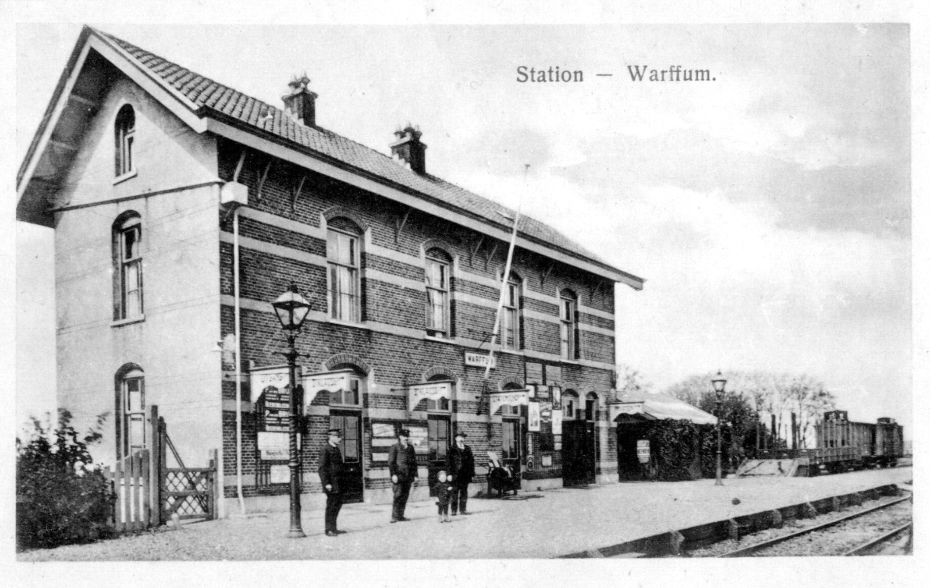 Station Warffum; circa 1910. Collectie van het Utrechts Archief.